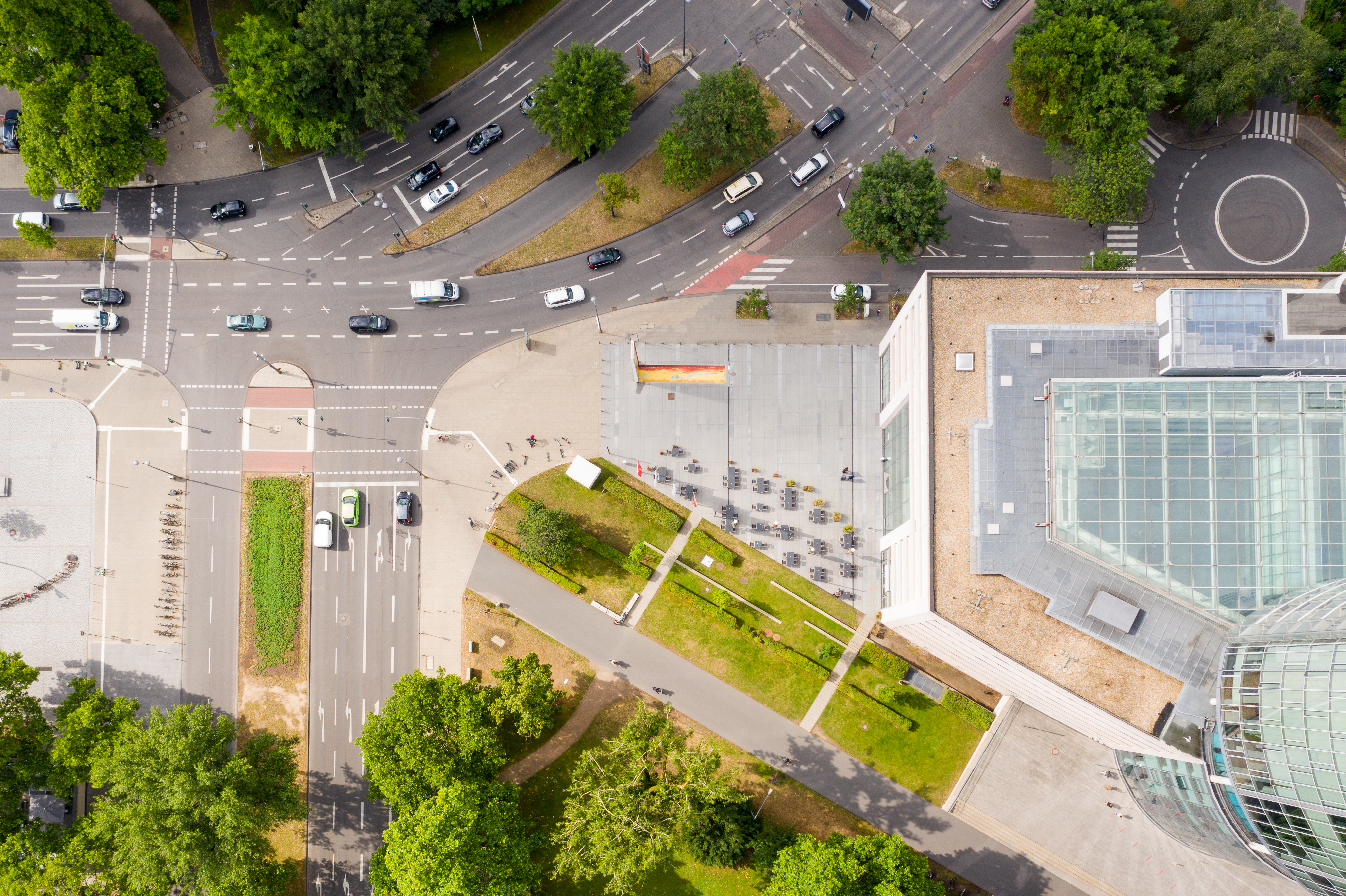 Köln-Deutz, Ottoplatz (westlicher Teil vor dem KölnTriangle), Kreuzung Auenweg (unten) mit Opladener Straße (links) und Mindener Straße (oben) - Luftaufnahme